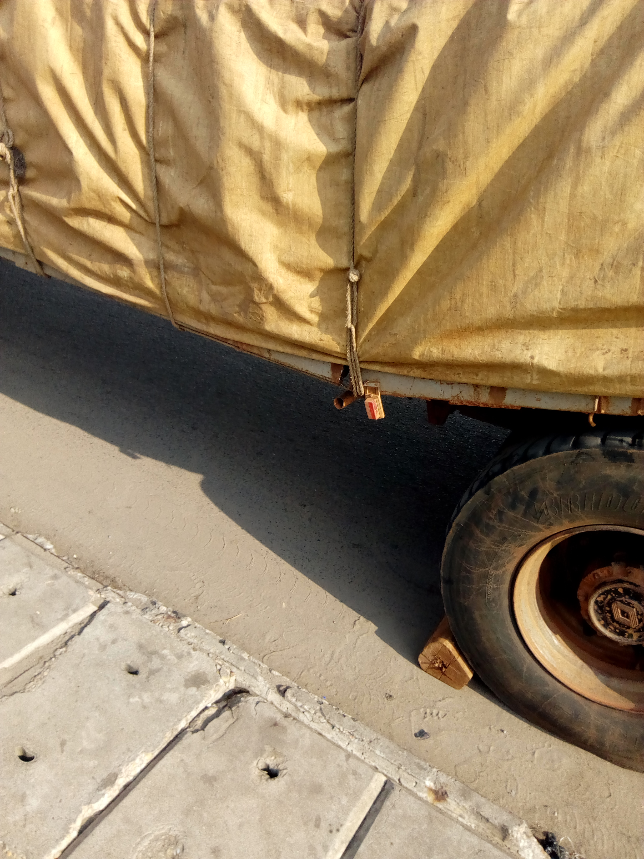 un cal pour voiture This is an image with the theme "Africa on the Move or Transport" from: Benin